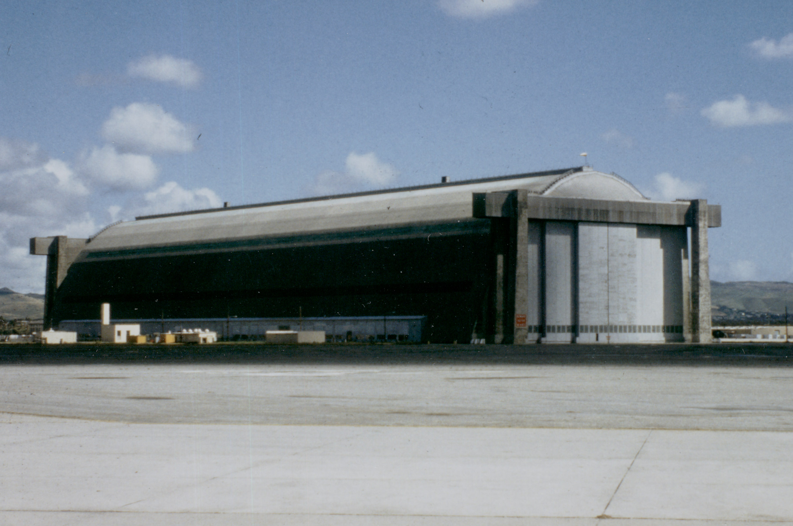 Luftschiffhalle in Tustin USA